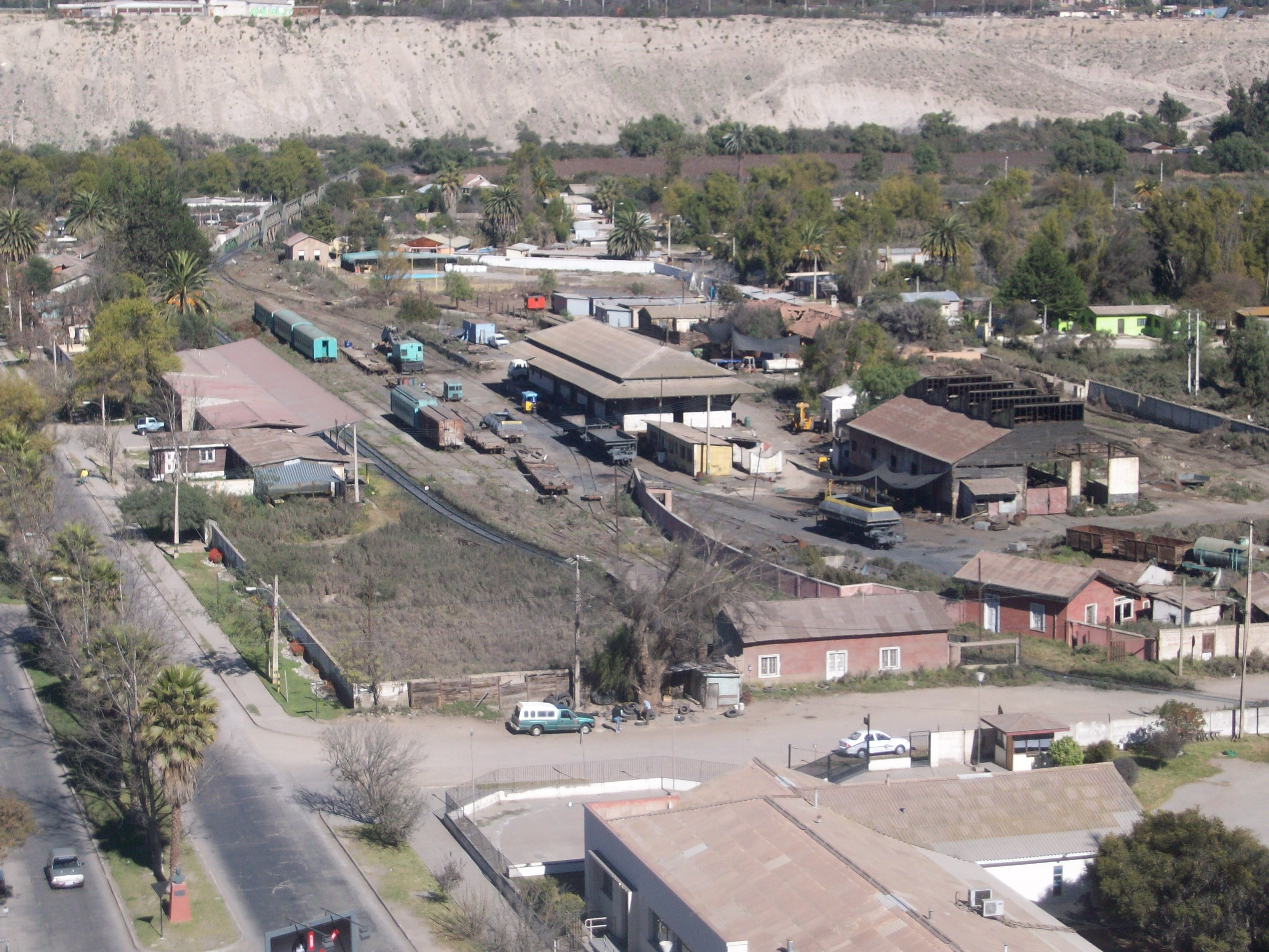 Vallenar, Chile